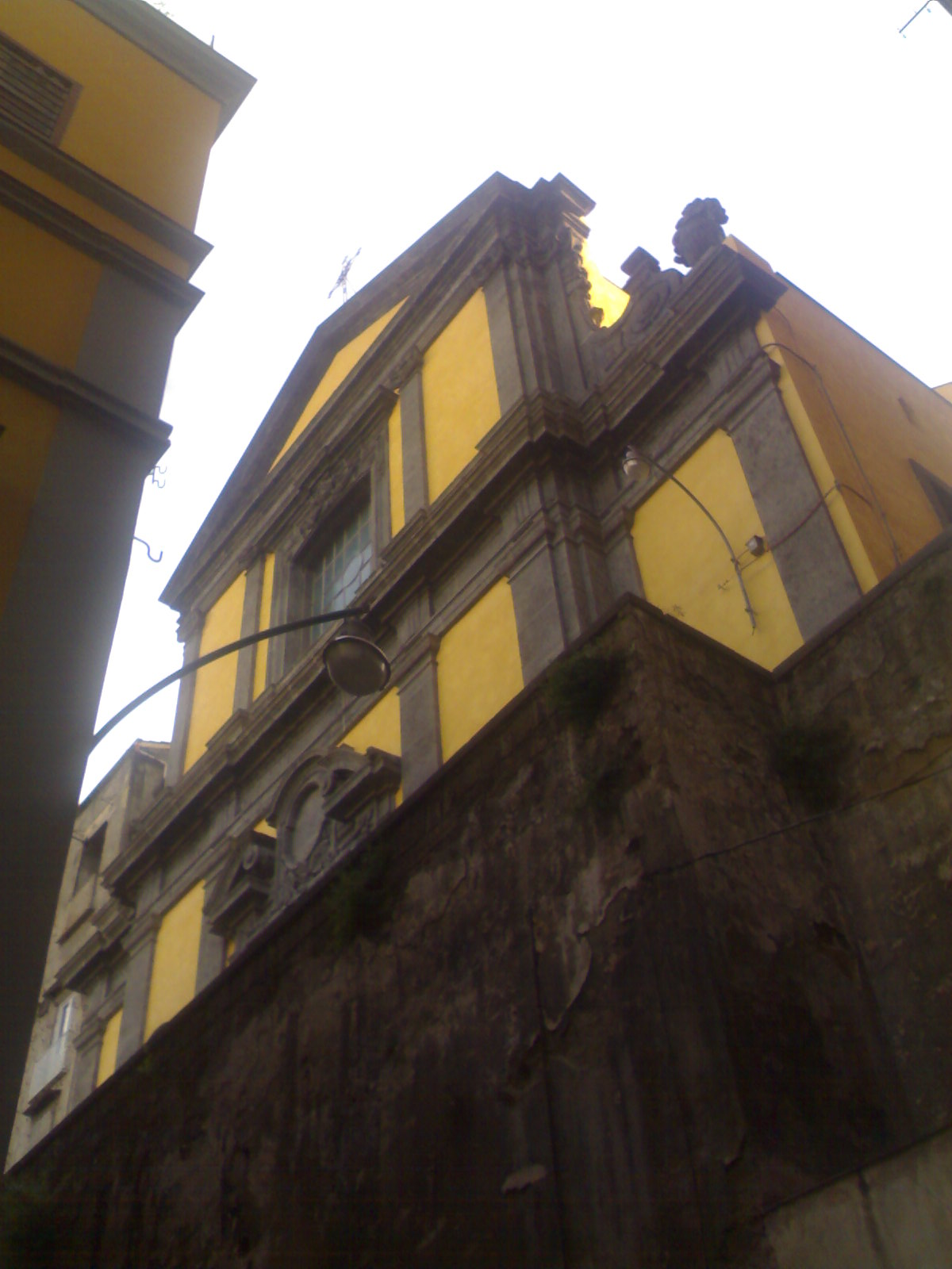 Facciata, Chiesa di Sant'Agostino degli Scalzi, Napoli